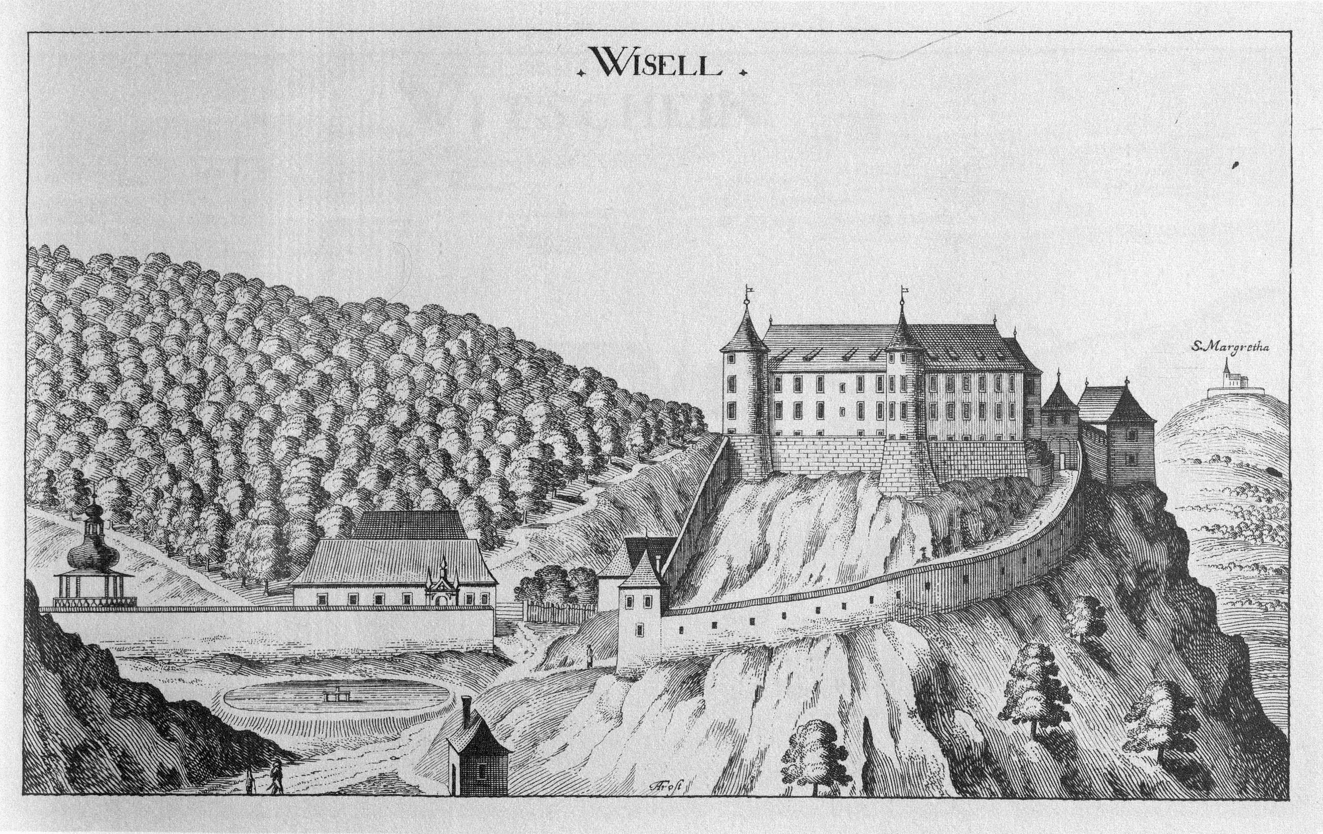 G. M. Vischers Käyserlichen Geographi, Topographia Ducatus Stiriae, Das ist: Eigentliche Delineation / und Abbildung aller Städte / Schlösser / Marcktfleck / Lustgärten / Probsteyen / Stiffter / Clöster und Kirchen / so es sich im Herzogthumb Steyrmarck befinden; Und anjetzo Umb einen billichen Preyß zu finden seynd Bey Johann Bitsch Universitäts Buchhandlern / Auff dem Juden=Platz bey der guldenen Saulen. Graz 1681 Die Nummerierung der Dateien folgt der alphabetischen Reihung der Ortsnamen und entspricht nicht dem Vischer-Register